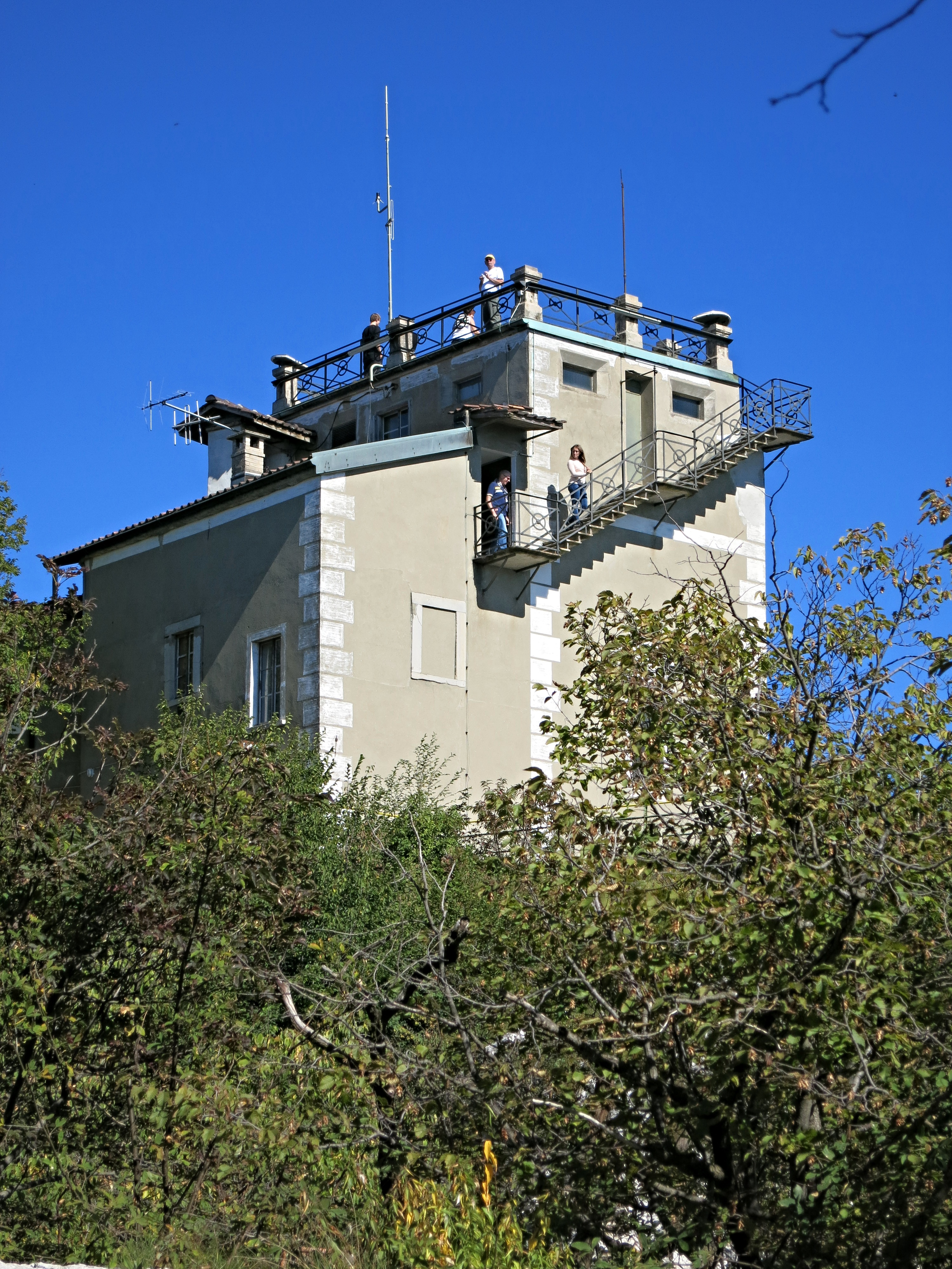 Aussichtsturm Monte San Salvatore